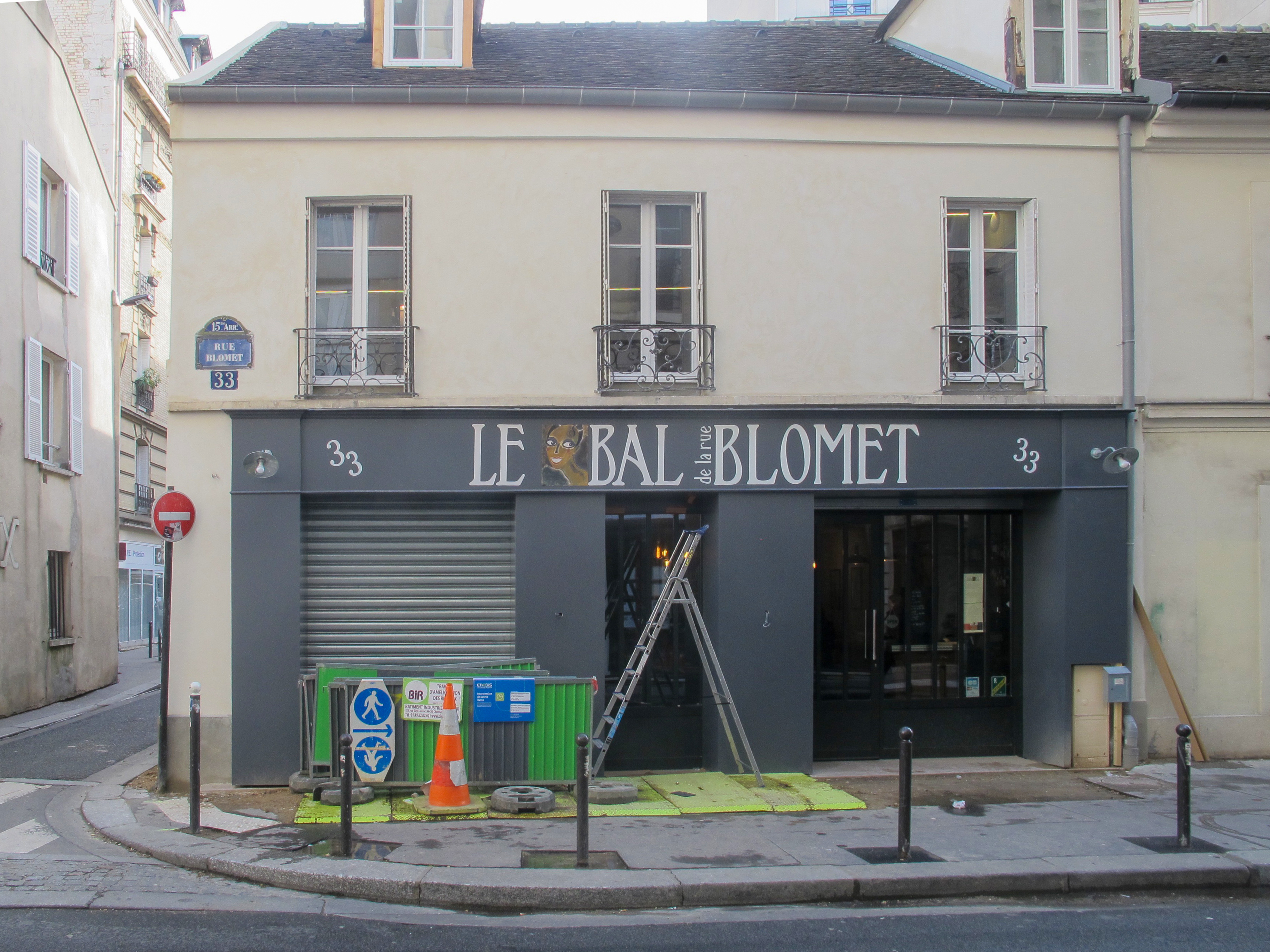 Bal de la rue Blomet.